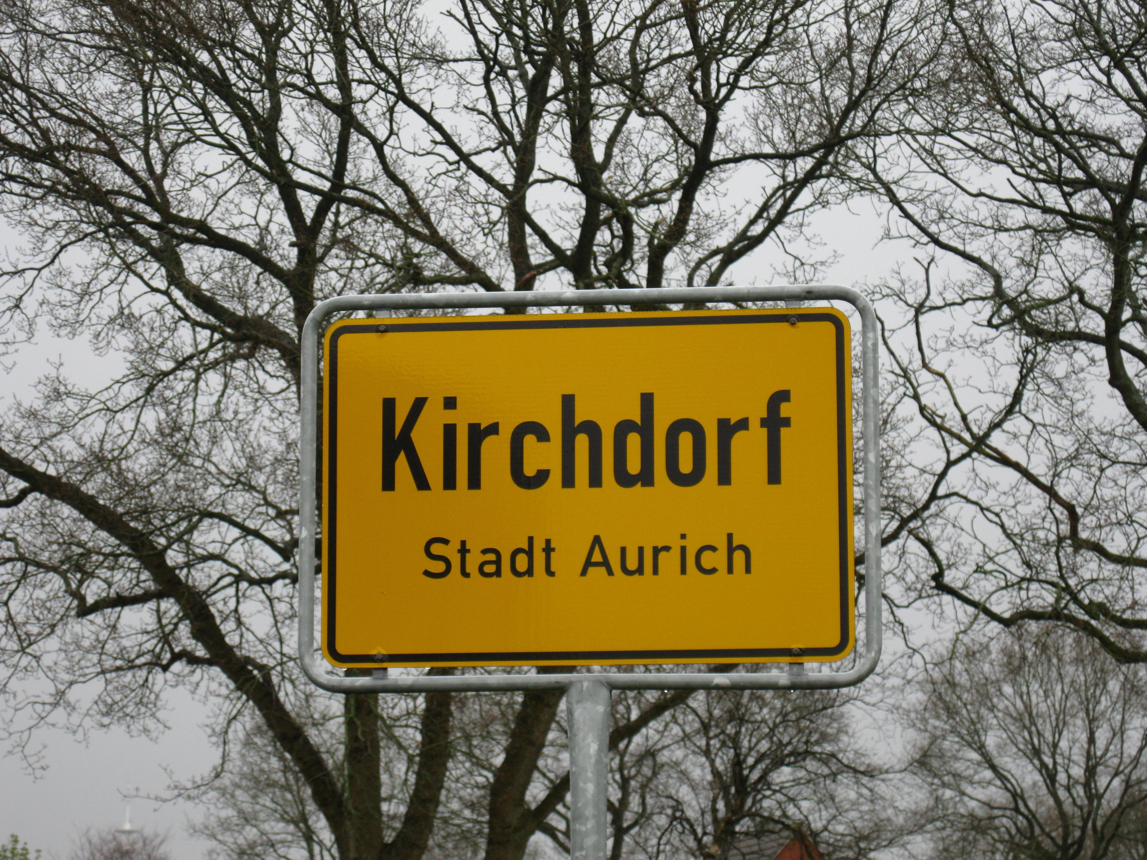 Ortschild von Kirchdorf Stadtteil von Aurich